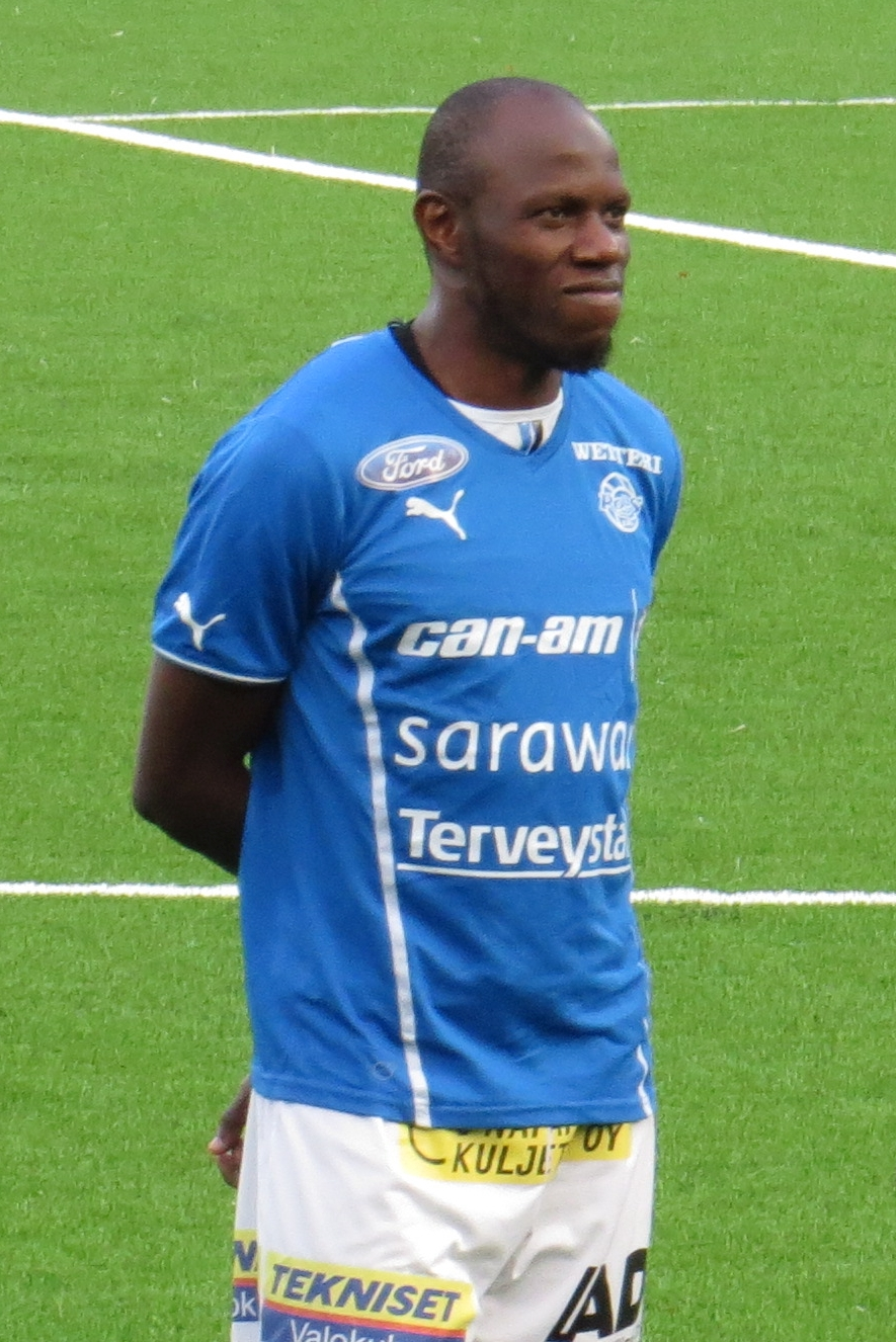 Abdou Jammeh, gambialainen jalkapalloilija Rovaniemen Palloseuran joukkueessa kaudella 2015.